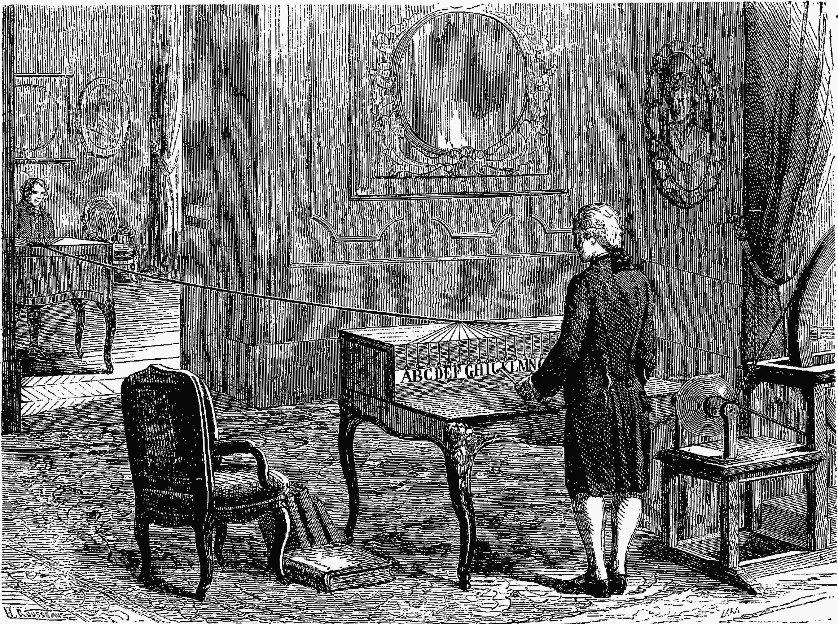 Le premier télégraphe électrique (appareil de Georges Lesage, exécuté à Genève, en 1714)